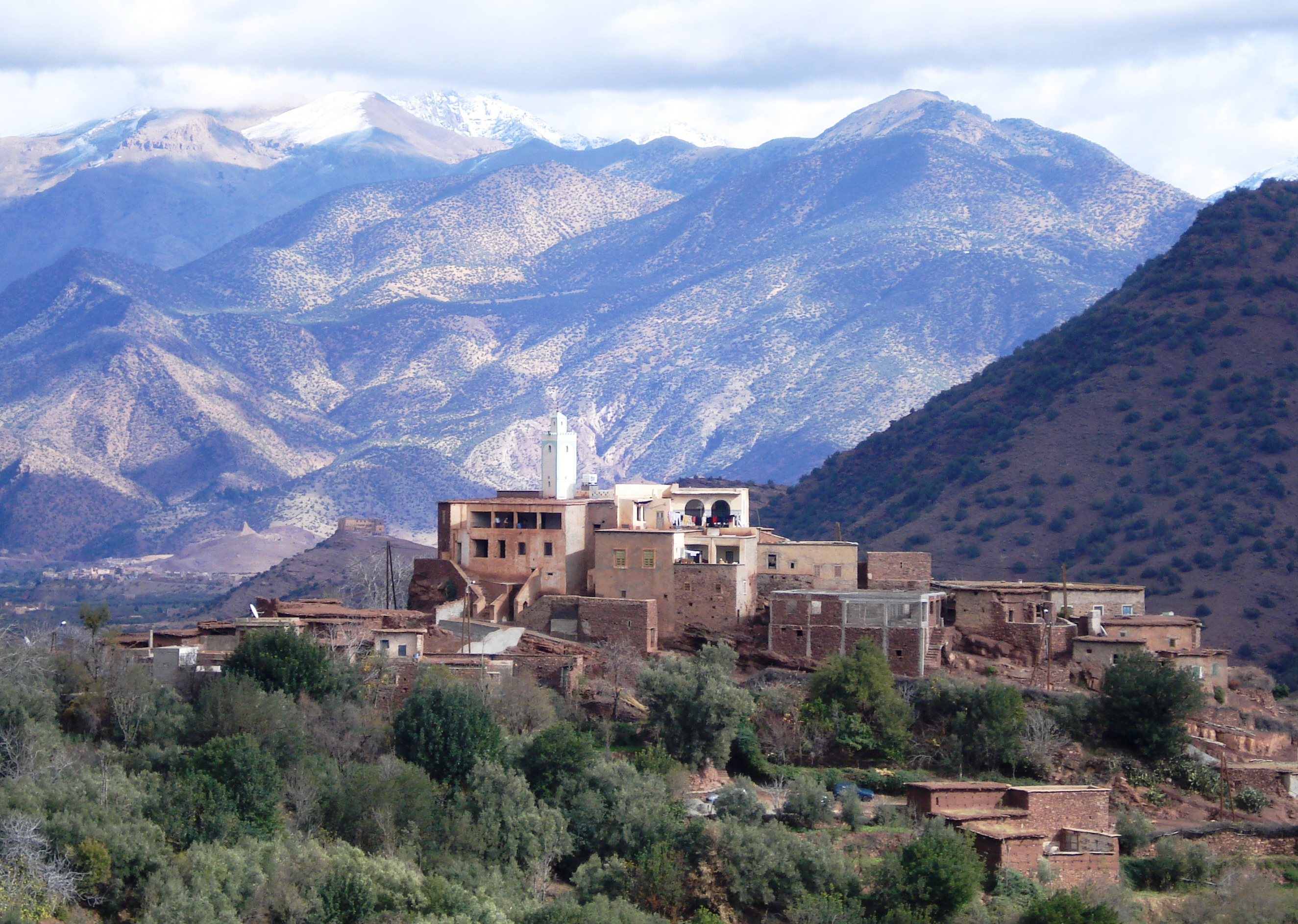 Tazalt.